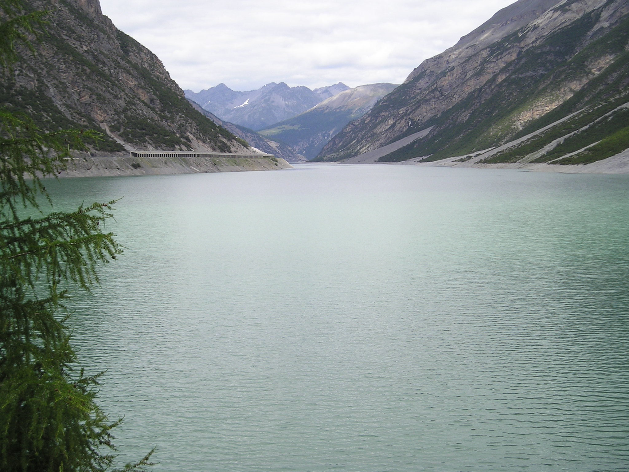 Lago del Gallo, autore Massimo Macconi